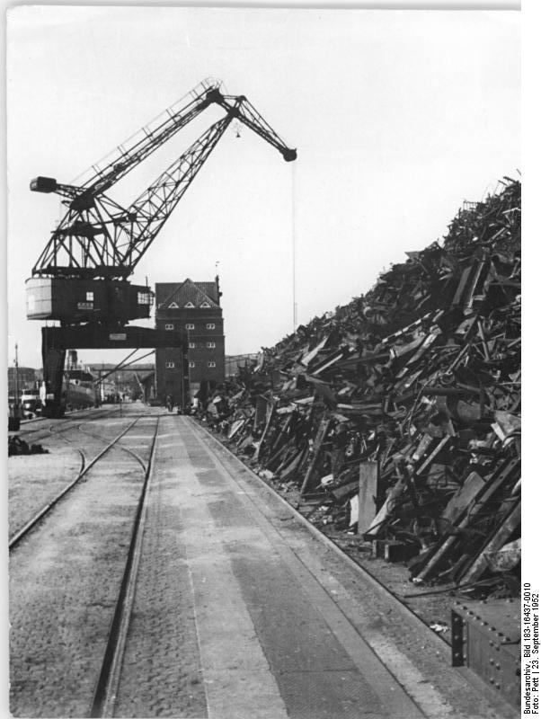 Zentralbild Pett Hein-Ho. 23.9.1952 Ausverkauf Westdeutschlands. UBz: Diese Schrottberge im Kieler Hafen werden in die englischen statt deutschen Stahlwerke geliefert. ________________________________________________________________________________________________ Description added/ Ergänzung vom 25.09.2009: Das Bild zeigt rechts den Bahnhofskai; rechts der Schrotthalde liegt der Hauptbahnhof Kiel. Das Speichergebäude bleibt nach dem 2. Weltkrieg erhalten und prägt das Bild des Bahnhofsvorplatzes. Links liegen einige Schiffe in der Hörn (südl. Abschluss der Kieler Förde bzw. des Kieler Hafens). Rechts hinten ist die Gablenzbrücke (Bogenbrücke) zu erkennen, die die hafennächste Hauptverkehrsverbindung über sämtliche Bahnhofsgleise hinweg zwischen dem Ostufer der Kieler Förde (Kiel-Elmschenhagen, Kiel-Gaarden, Kiel-Ellerbek usw.) und dem Westufer (Stadtzentrum) bildet.